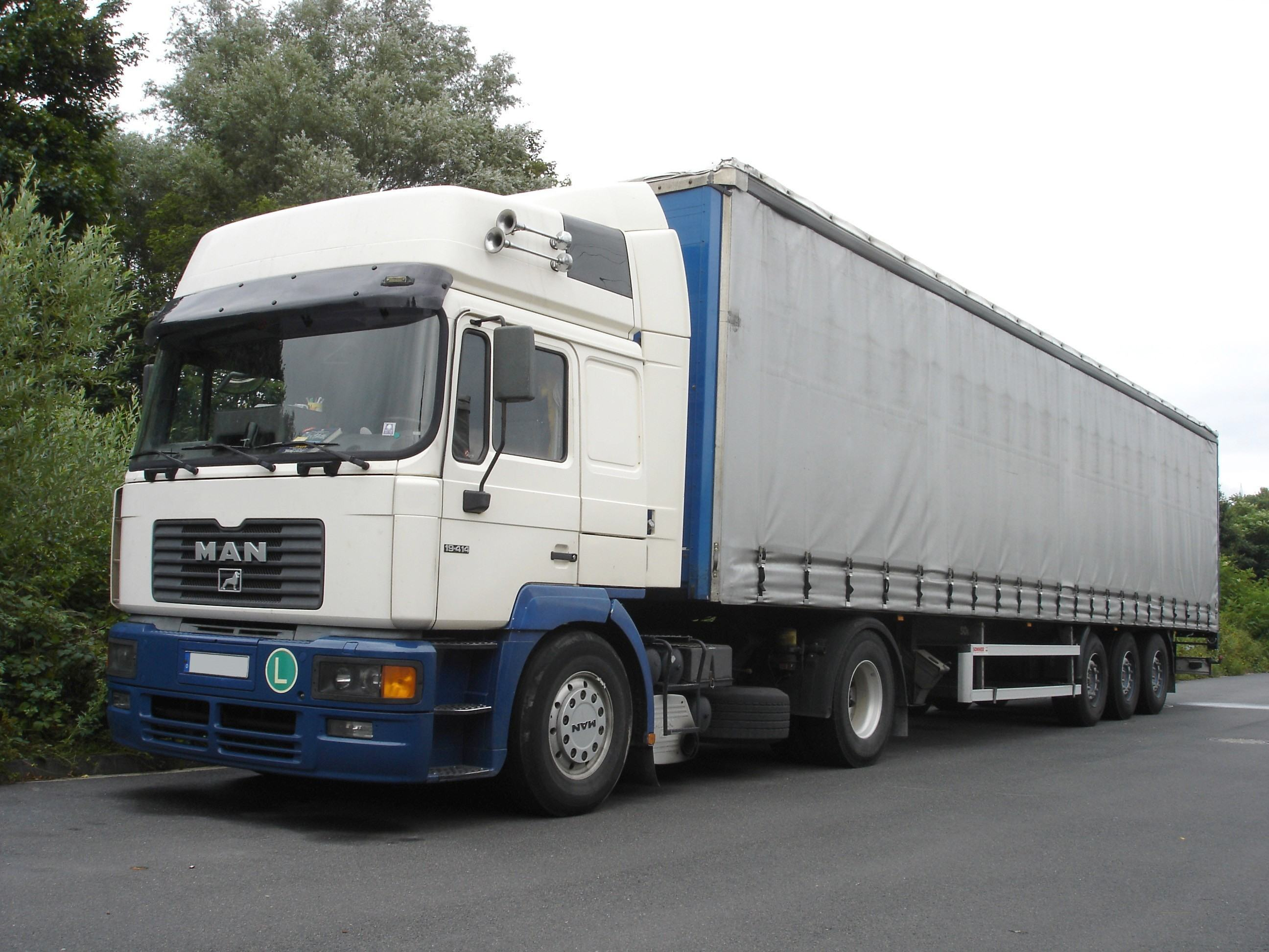 MAN F2000 Evo Gardinensattelzug